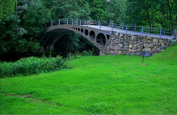 Løkke bro er en bro over Sandvikselven i Sandvika. Broen er Norges første støpejernsbro